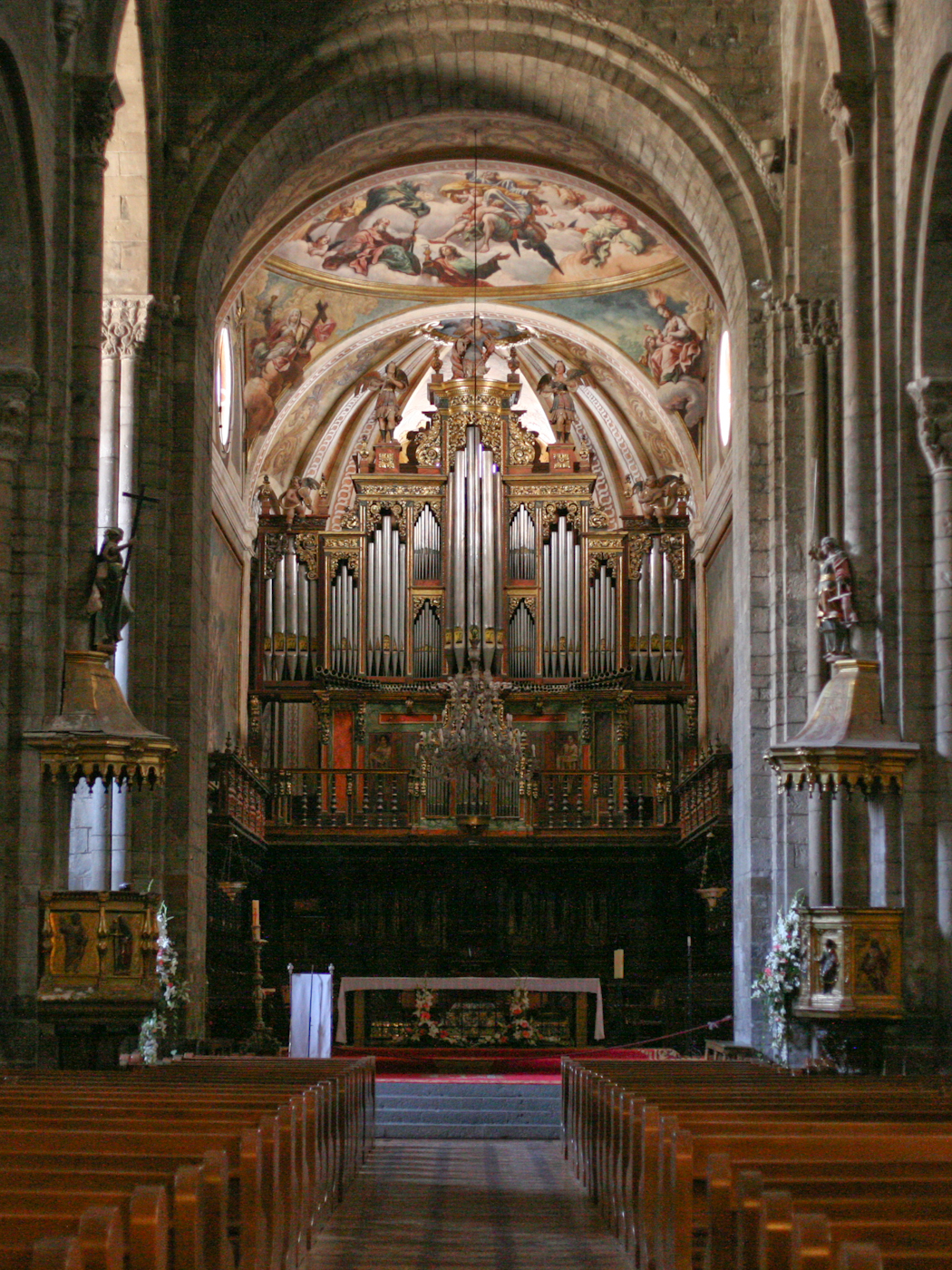 Innenansicht der Kathedrale von Jaca